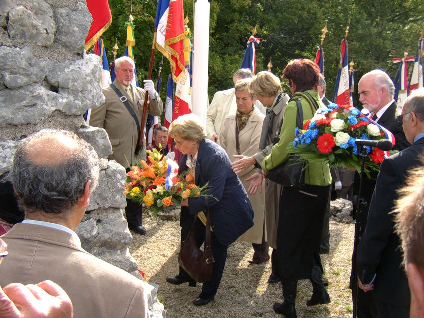 Cérémonie devant la stèle du "Rocher de Valmy", en l'honneur des Martyrs du groupe Guy Mocquet